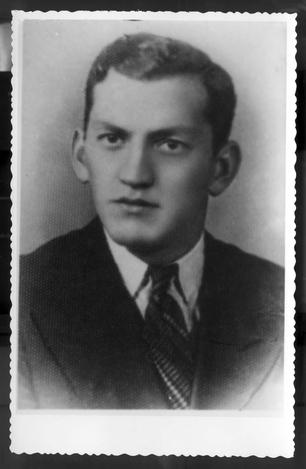 מיכאל רוזנפלד - תמונת פספורט 1